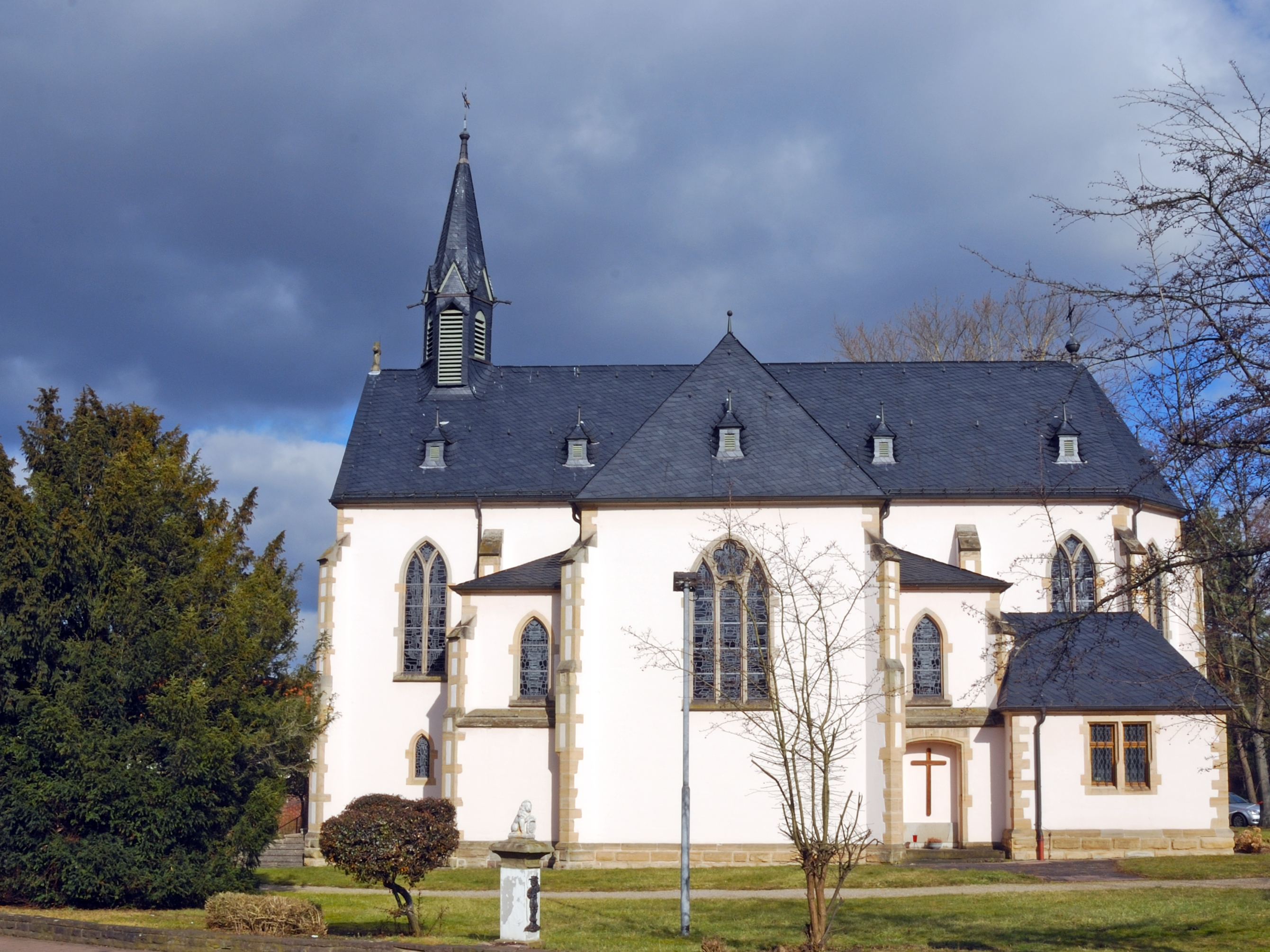 Kath. Stadtkirche Wanfried - Blick aus Süd